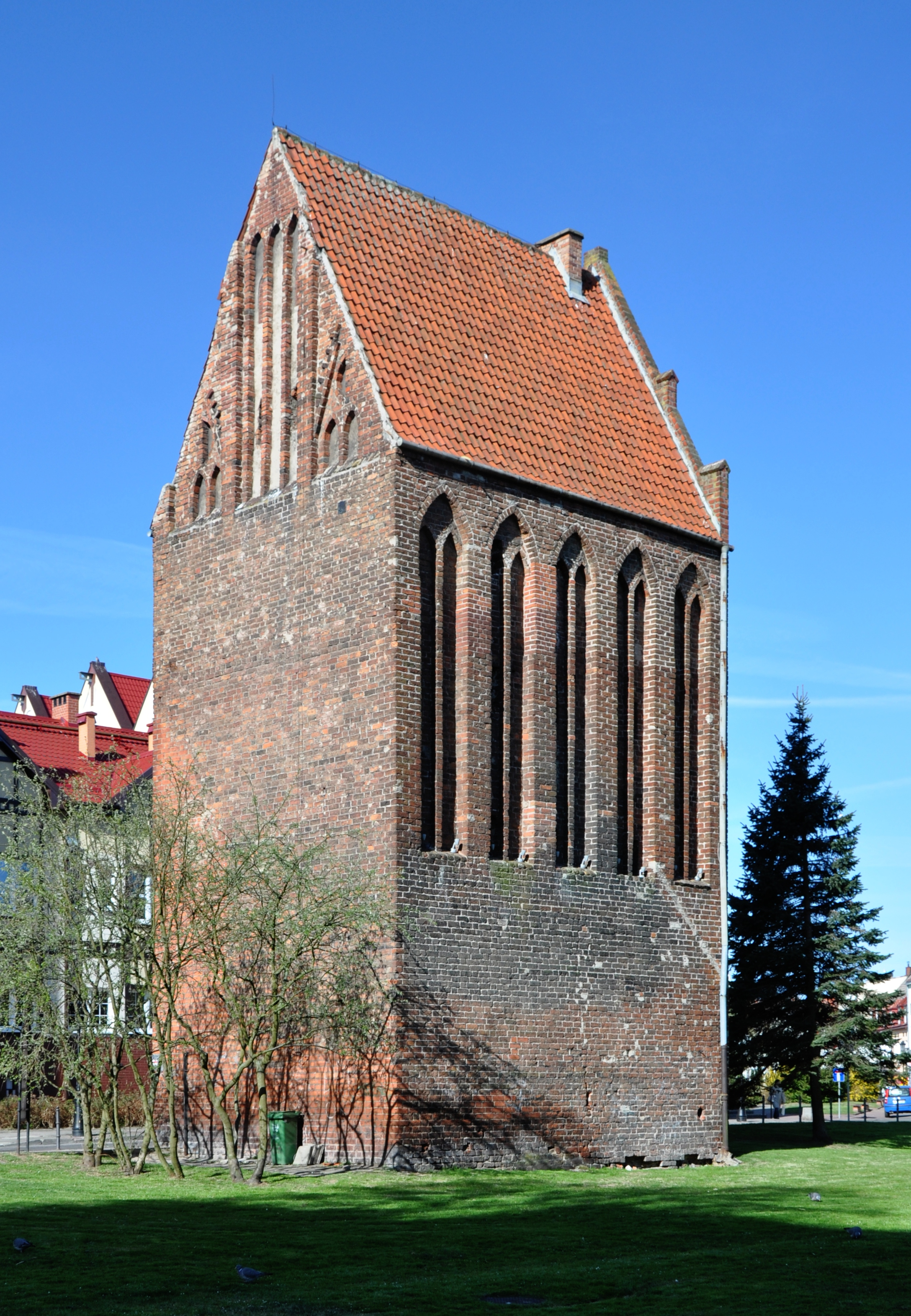 Baszta Lontowa w Kołobrzegu – ujęcie od wschodu, z parku